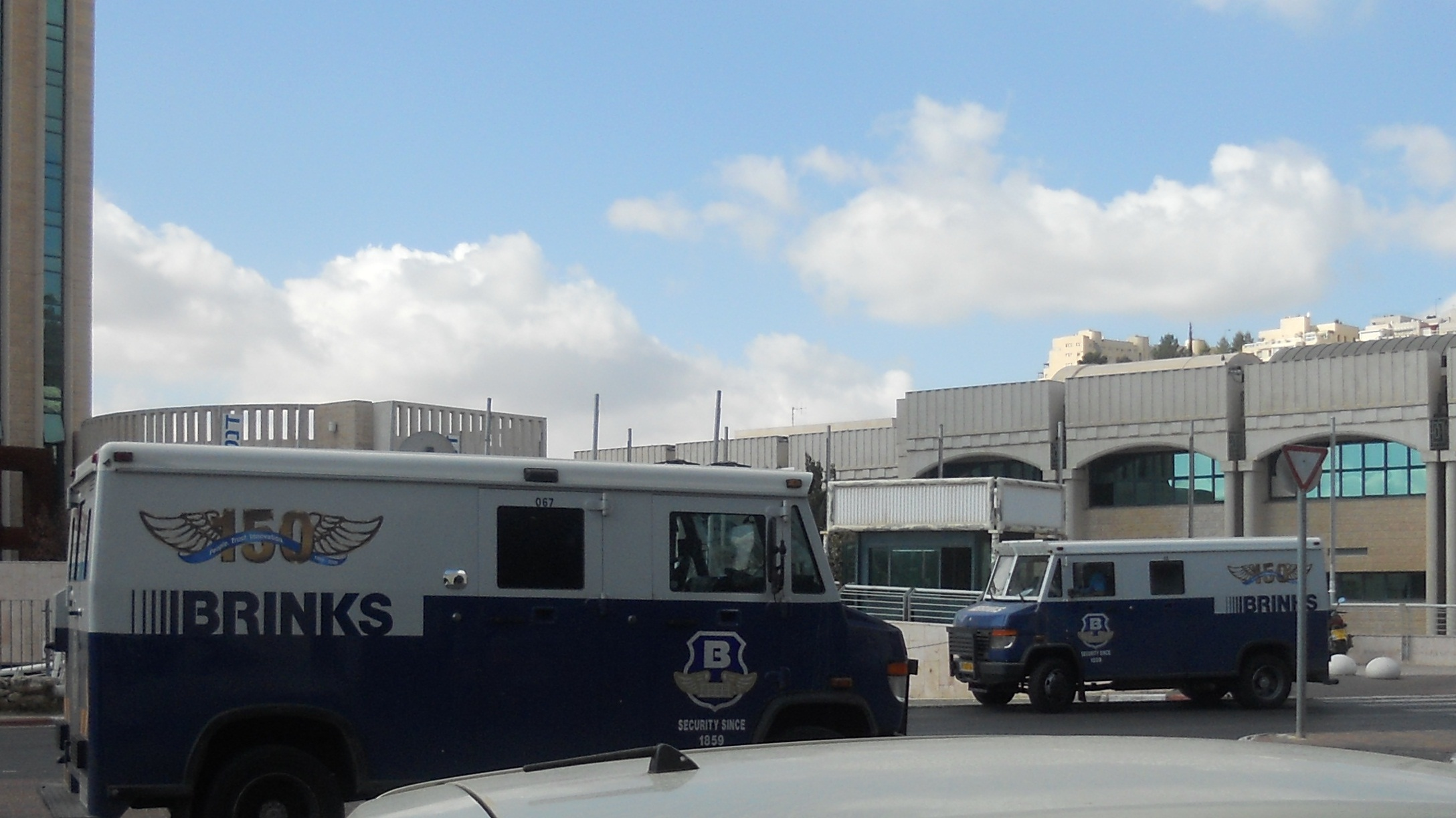 רכבים של חברת ברינקס